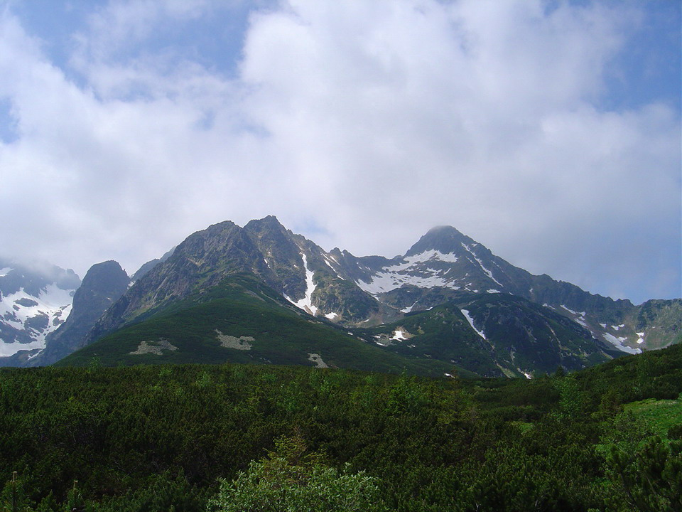 Jahnaci_stit_from_Dolina_Kezmarskej_Bielej_vody